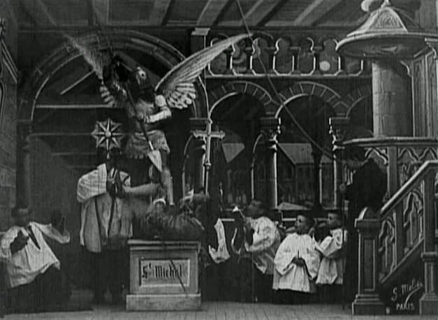 Méliès, Le diable au couvent (Star Film 185-187) 3